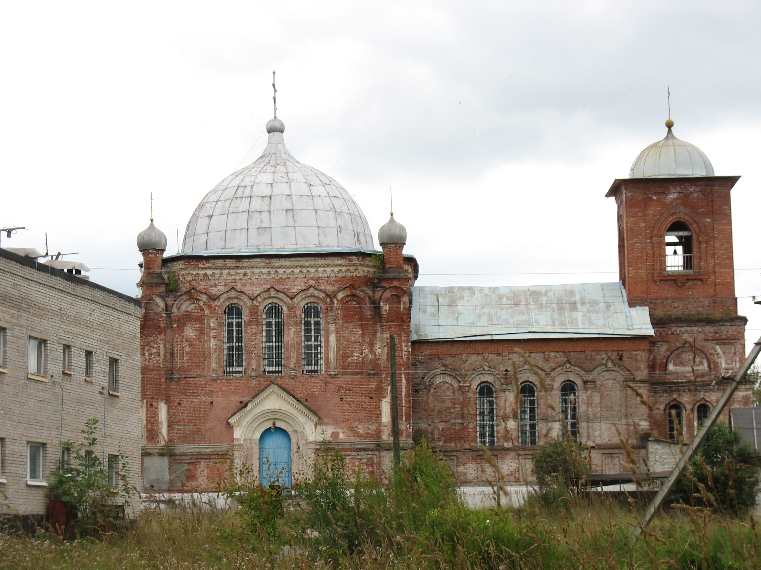 Церковь Рождества Христова в посёлке Угловка. Вид с улицы Ленинградской.